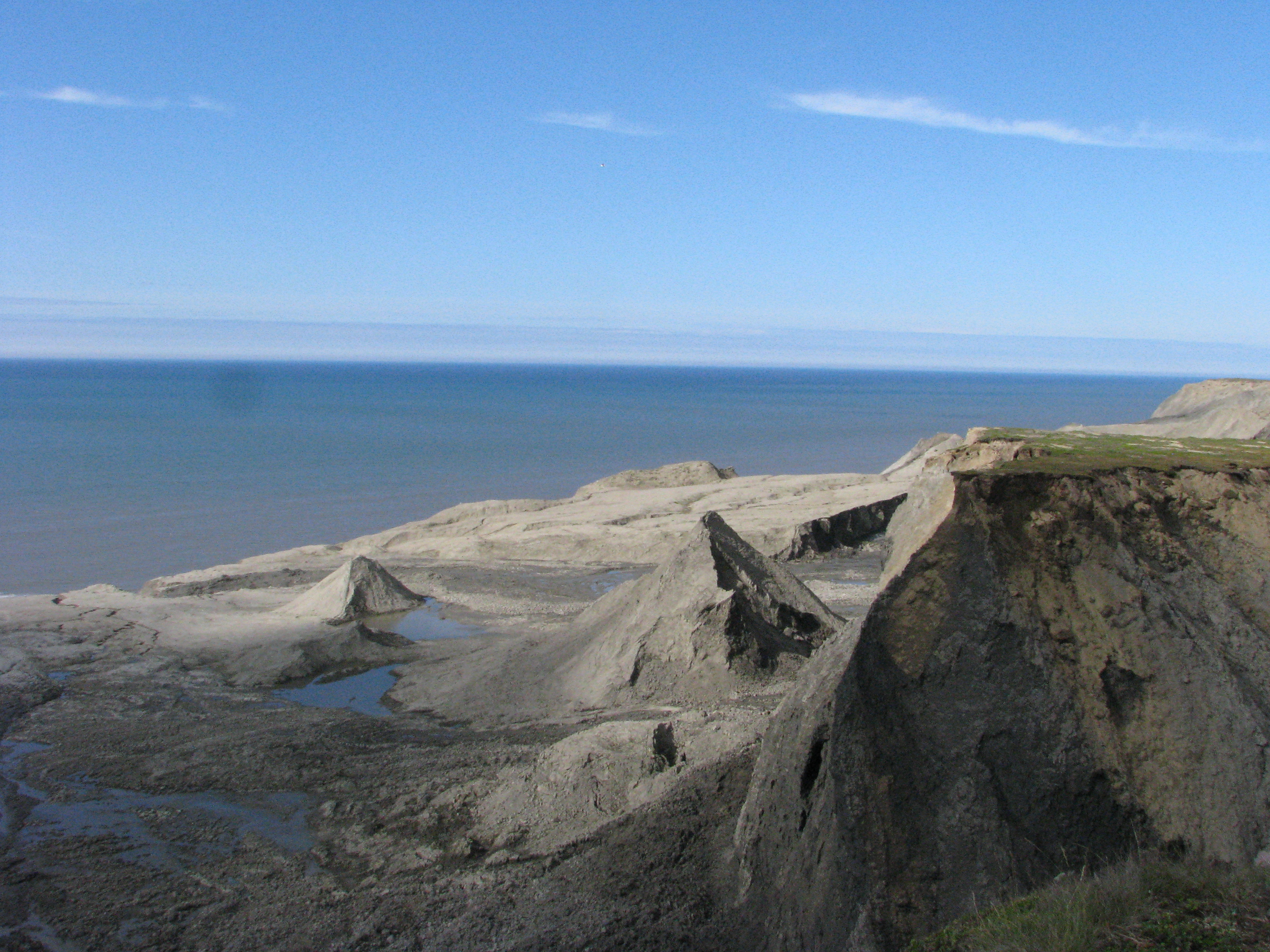 Колгуев остров, Заполярный район. Размывание вечномерзлотного берега. This image is related to the protected area of Russia number 8310013